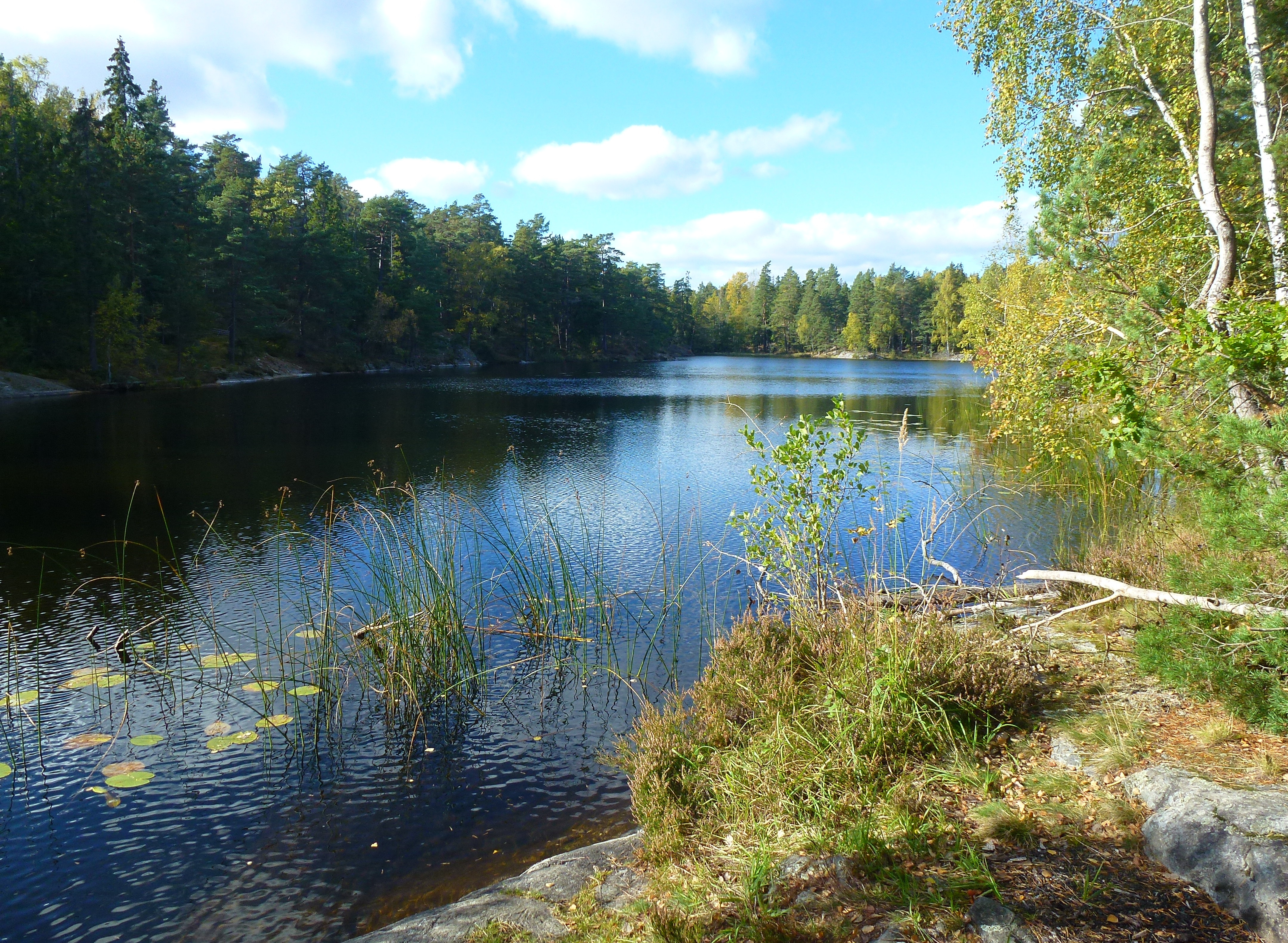 Tattby naturreservat, Dammsjön